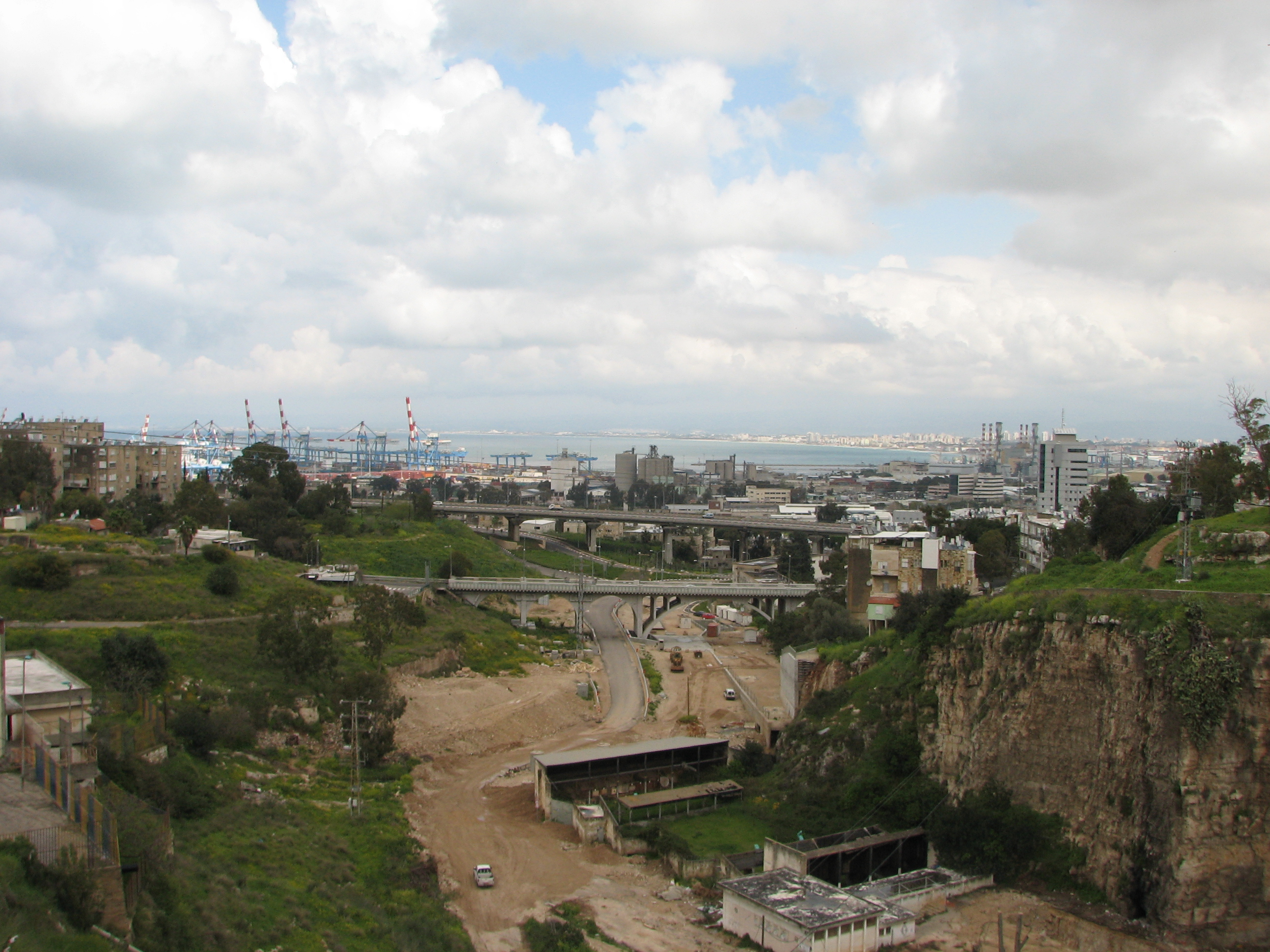 Giborim Wadi, Haifa Israel נחל גיבורים הנקרא גם ואדי רושמיה, הוא נחל אכזב העובר במזרח חיפה, מעל הנחל עובר גשר הגיבורים נחל גיבורים בחלקו הצפוני, צולם מרמת ויזניץ. בחזית שני גשרים, גשר גיבורים או גשר רושמיה, וגשר גדוד 22